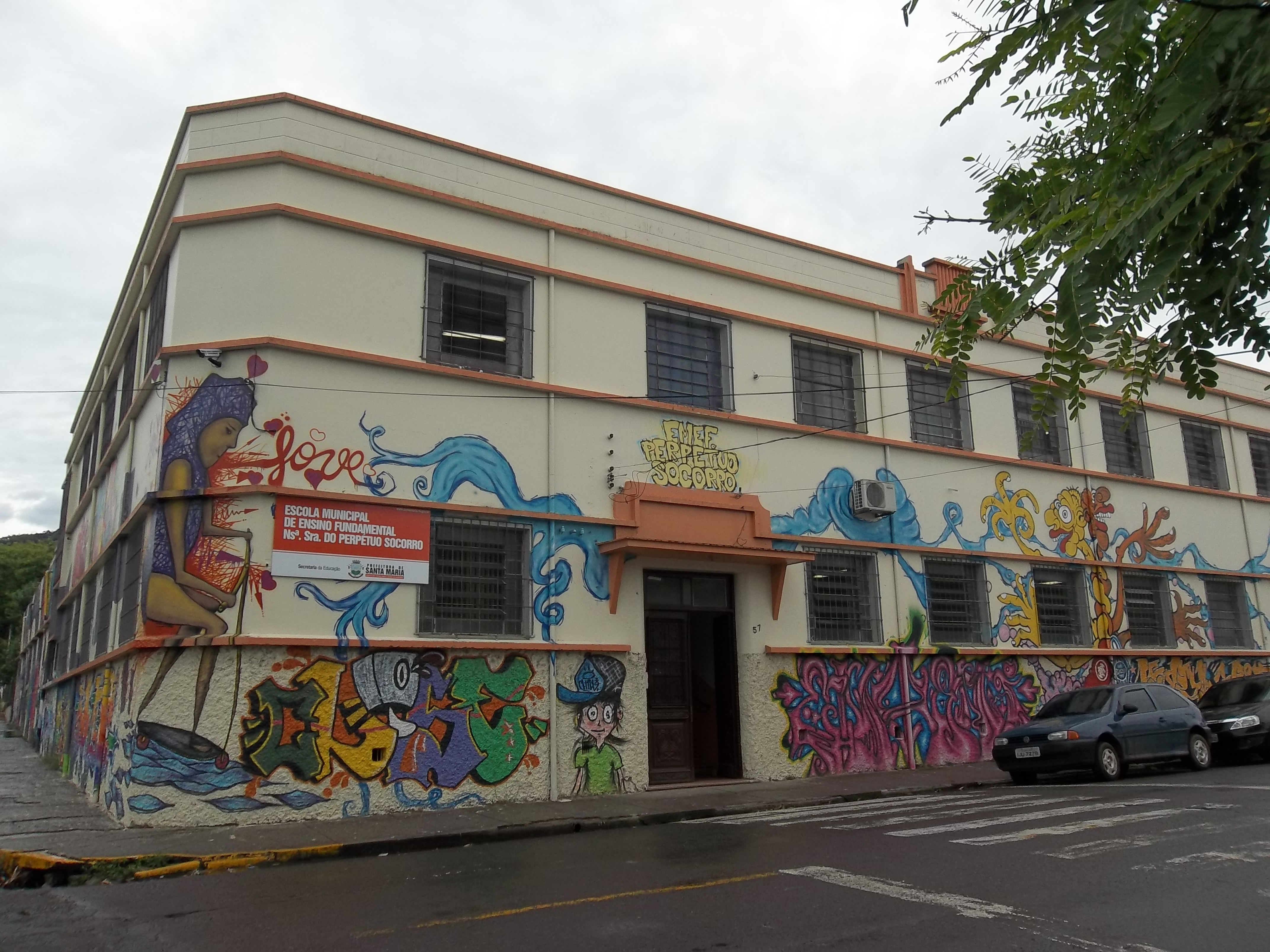 Escola Nossa Senhora do Perpétuo Socorro, Sede, Santa Maria, Rio Grande do Sul, Brasil.